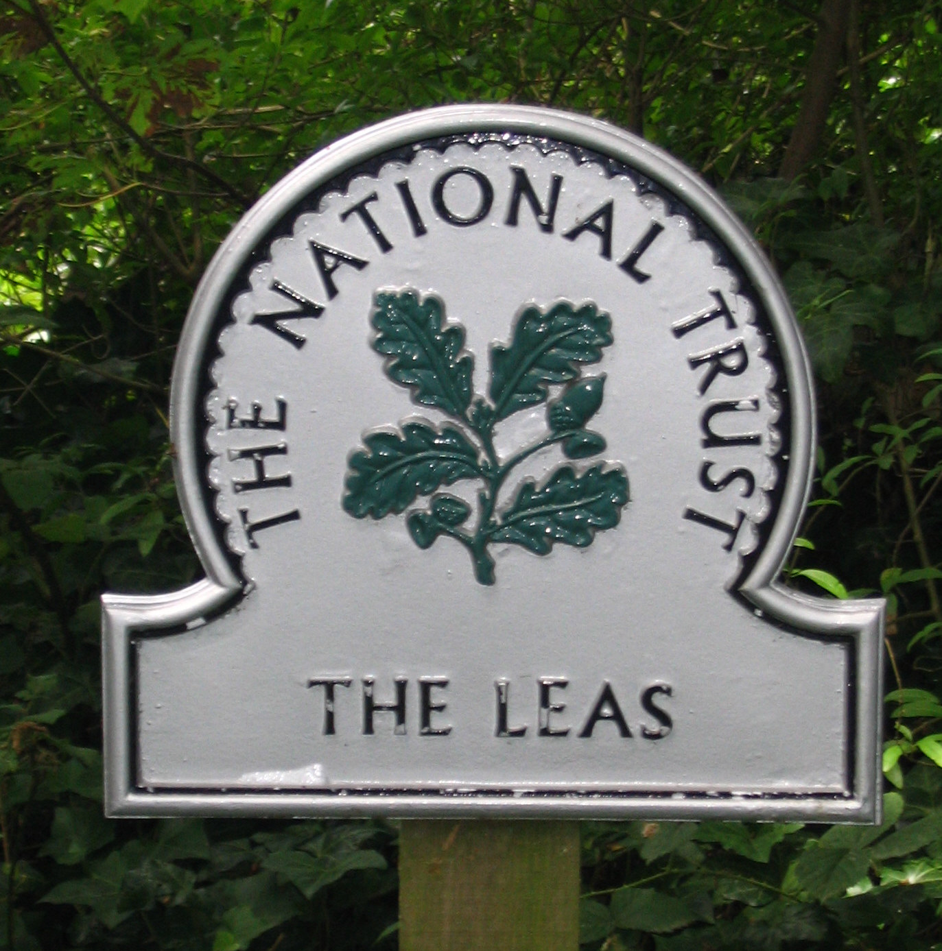 Plaque d'information du National Trust Auteur:P. Charpiat - 2006